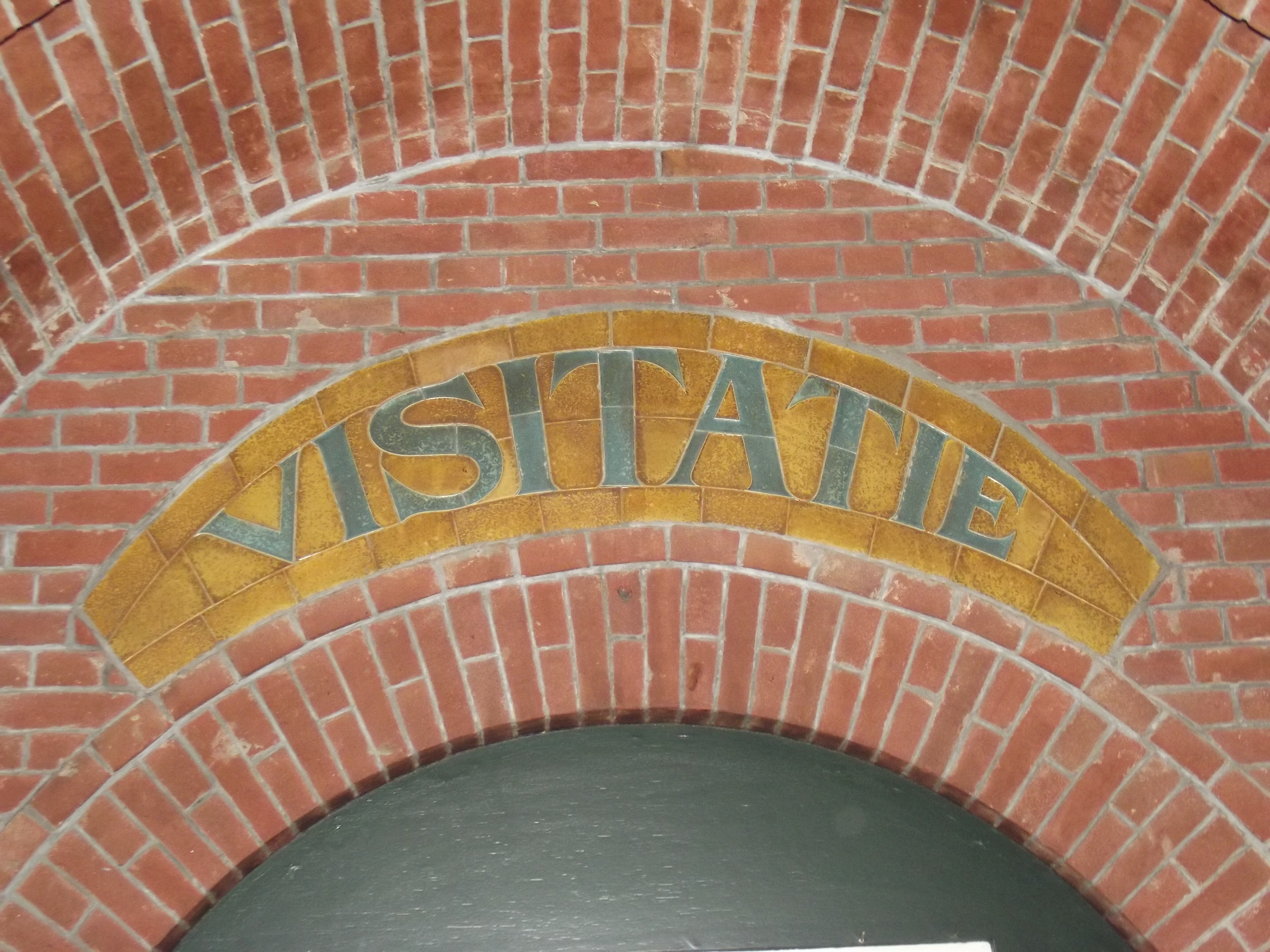 Tegelopschrift "visitatie" in boogvorm. Maakt deel uit van drie doorgangen. Geeft nu toegang tot een kantoor.